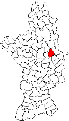 Categorie:Hărţi ale judeţului Olt